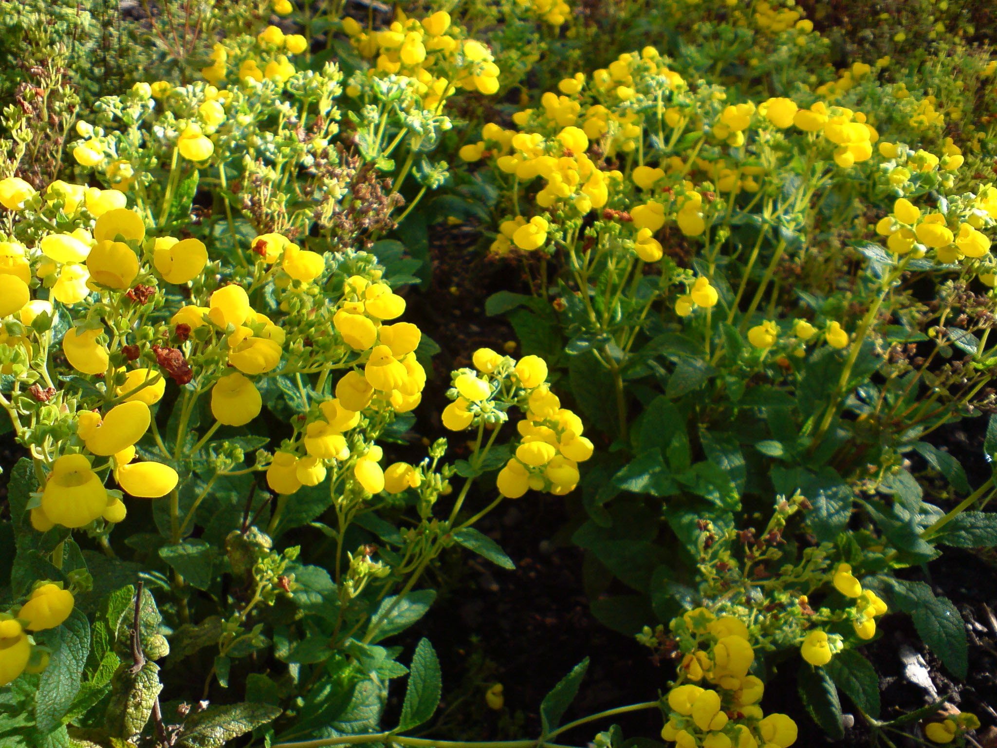 Calceolaria integrifolia (Strauch-Pantoffelblume) - Botanischer Garten Leipzig